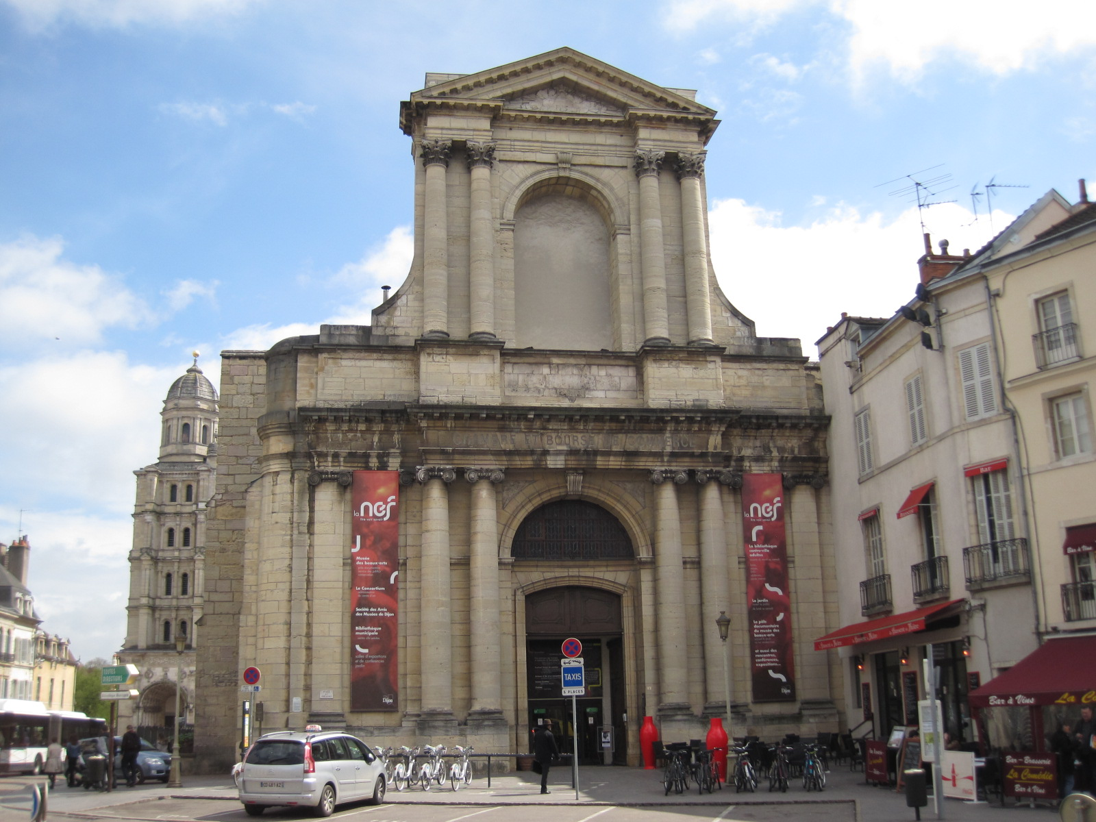 Église Saint-Étienne de Dijon